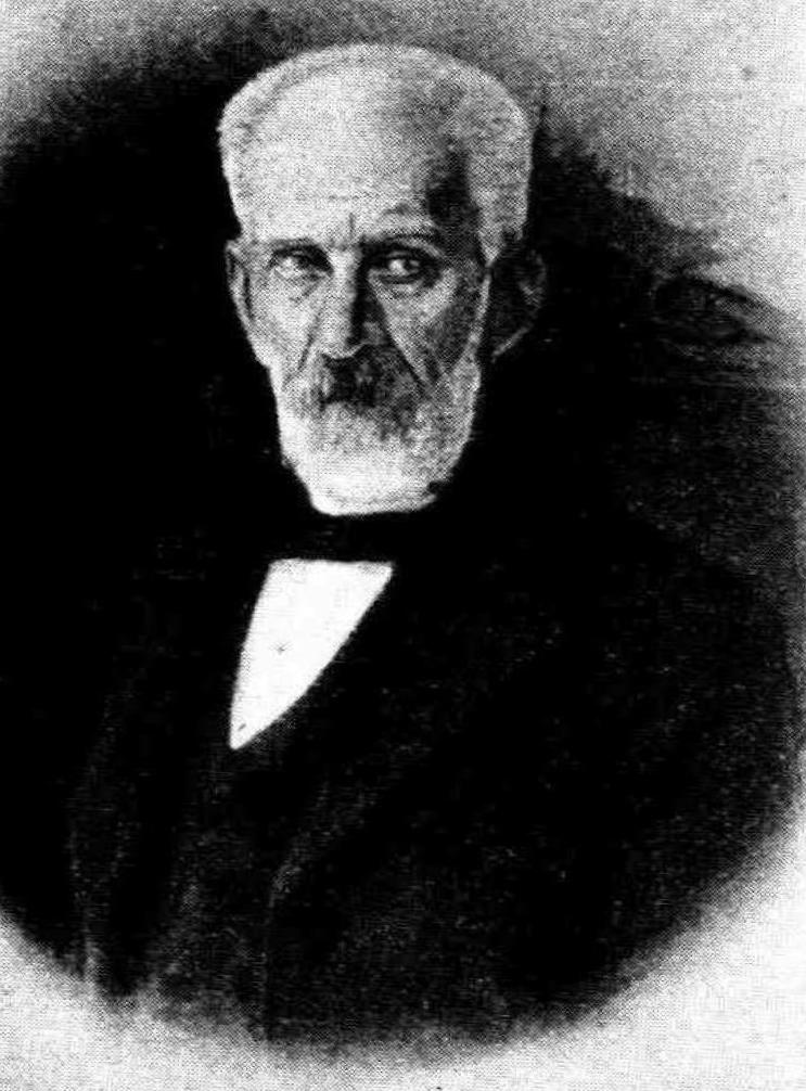 griechischer Politiker, 19. Jahrhundert